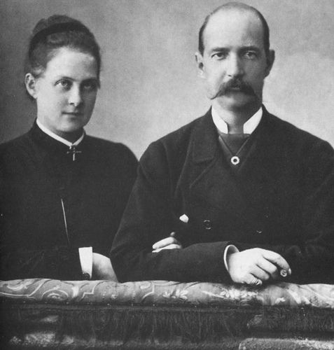 Rei Jorge I da Grécia com a sua esposa, a Grã-duquesa Olga Constantinovna da Rússia